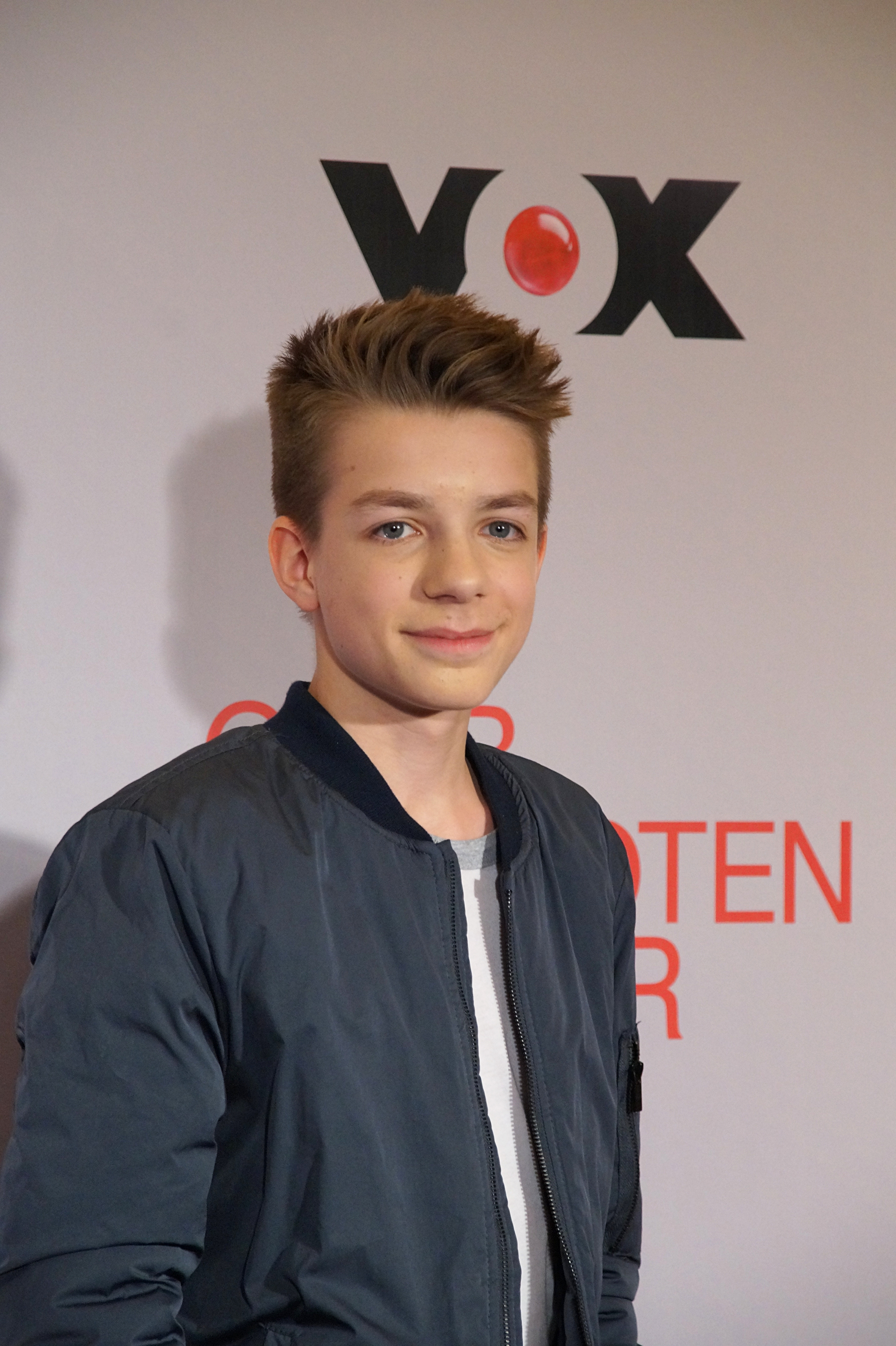 Nick Julius Schuck bei der Preview der 2. Staffel "Club der roten Bänder", Oktober 2016.